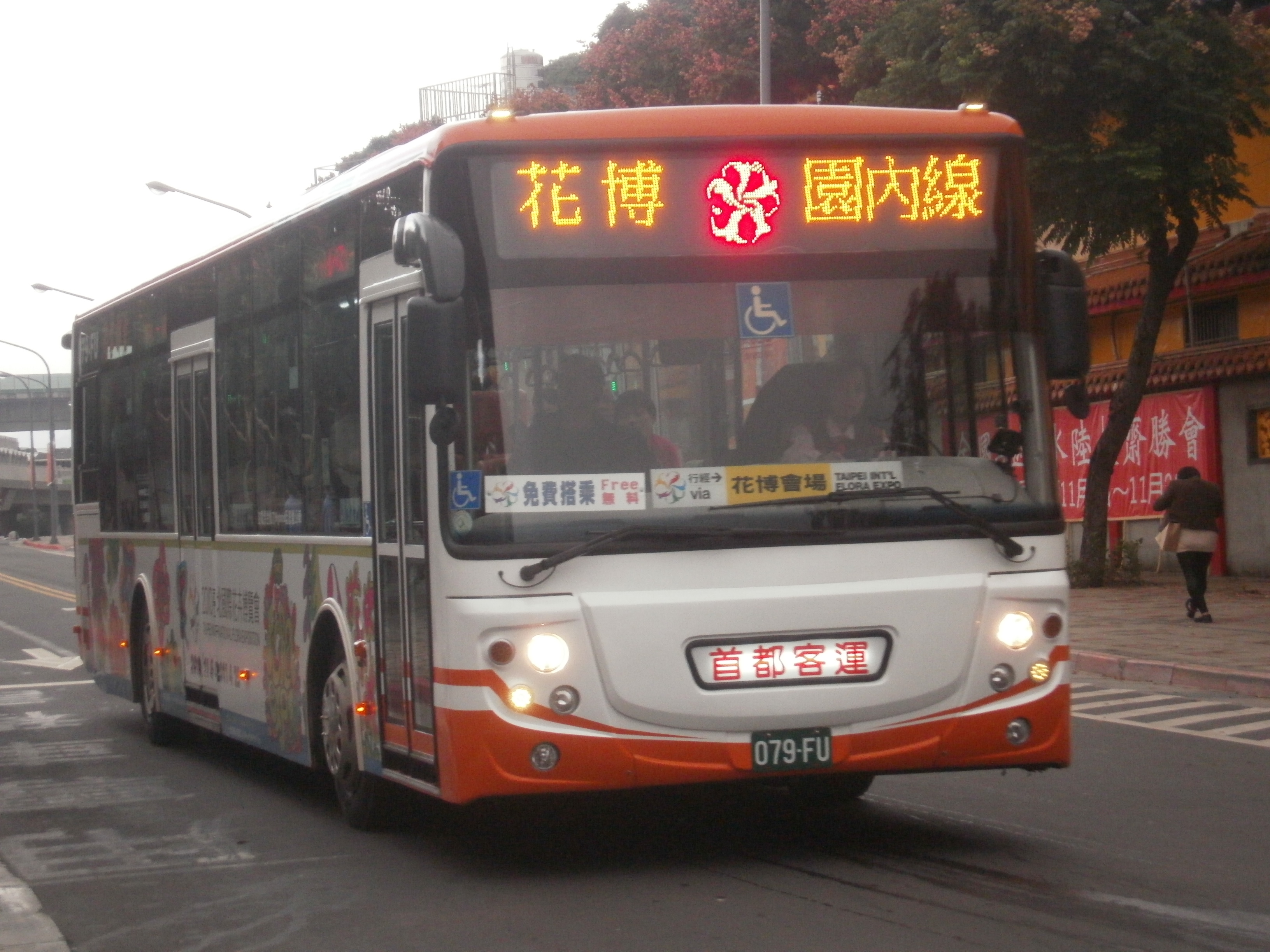 首都客運花博園內線公車。